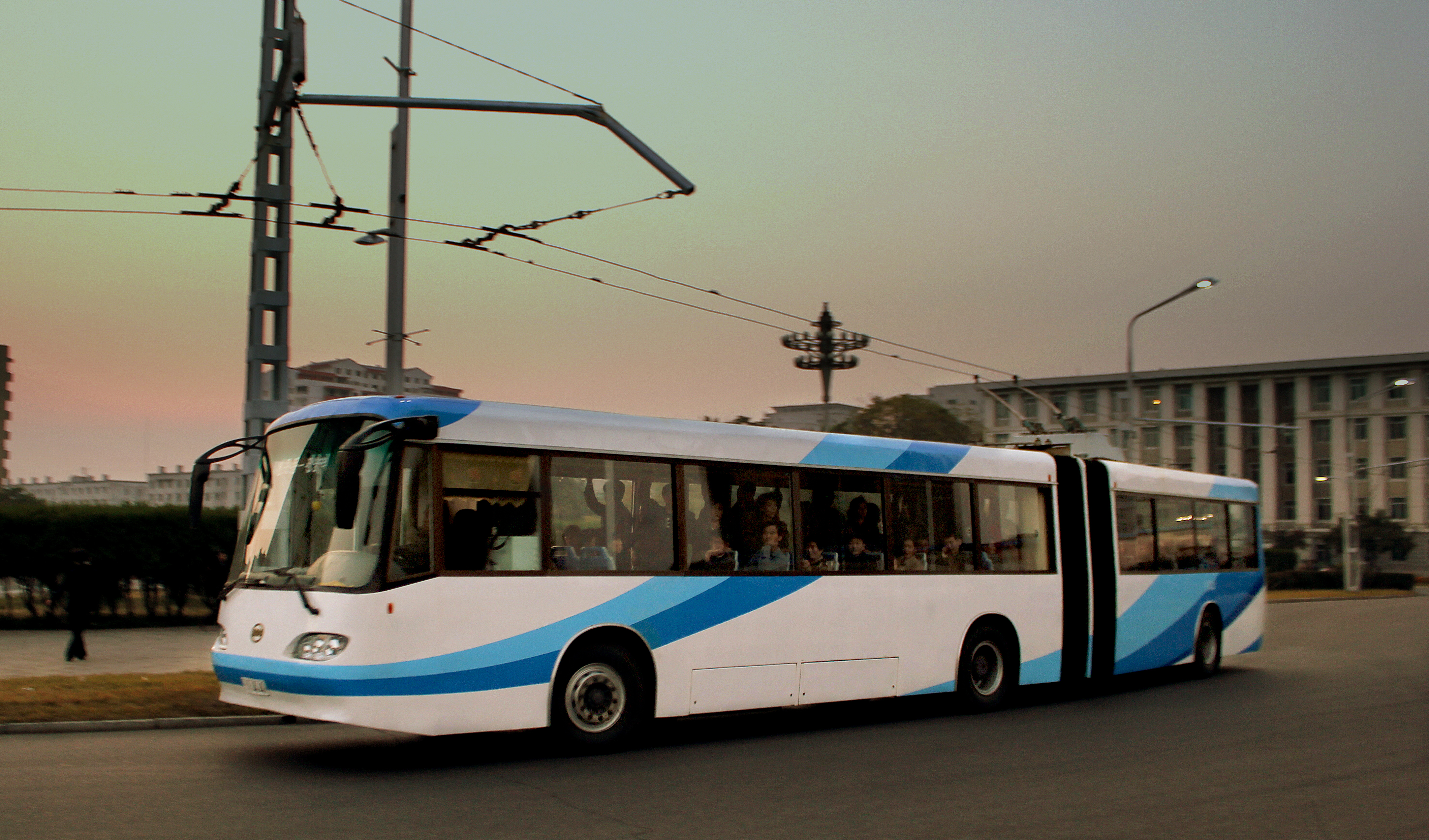 PYONGYANG CITY TROLLEY BUS PYONGYANG DPRK NORTH KOREA OCT 2012